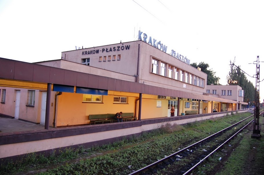 Widok z pociągu na stację Kraków Płaszów